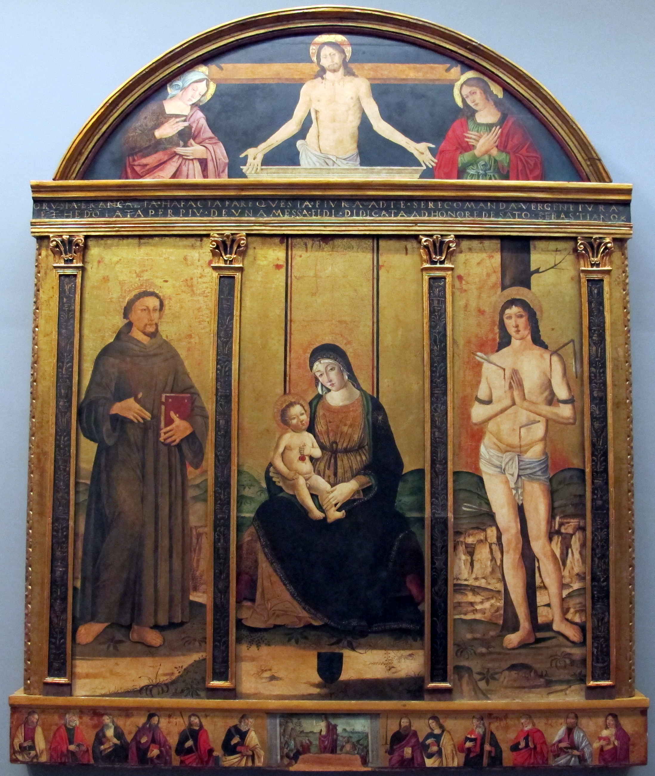 Galleria Napoletana (Museo di Capodimonte)